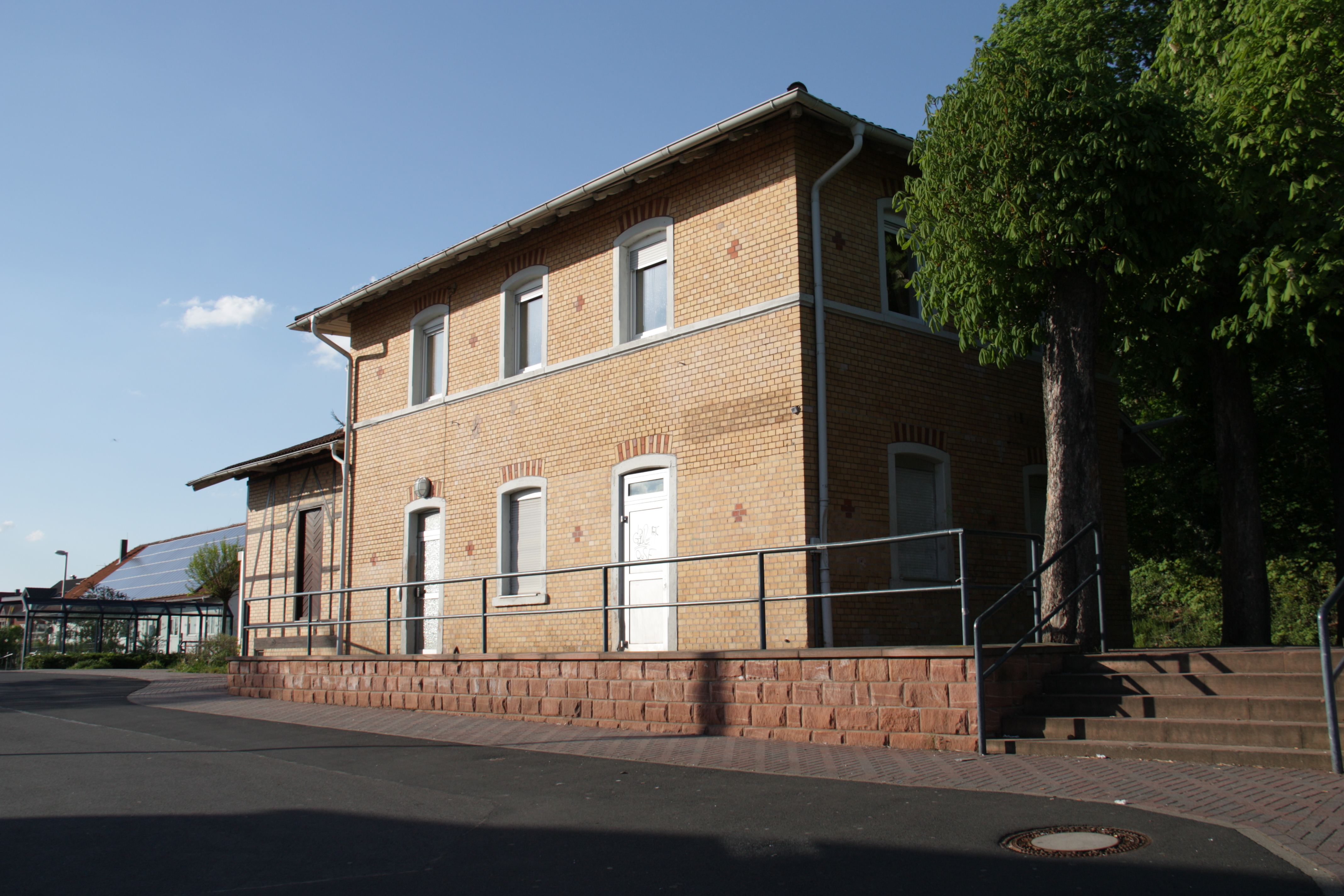 Der Bahnhof von Alzenau (Hauptbahnhof)